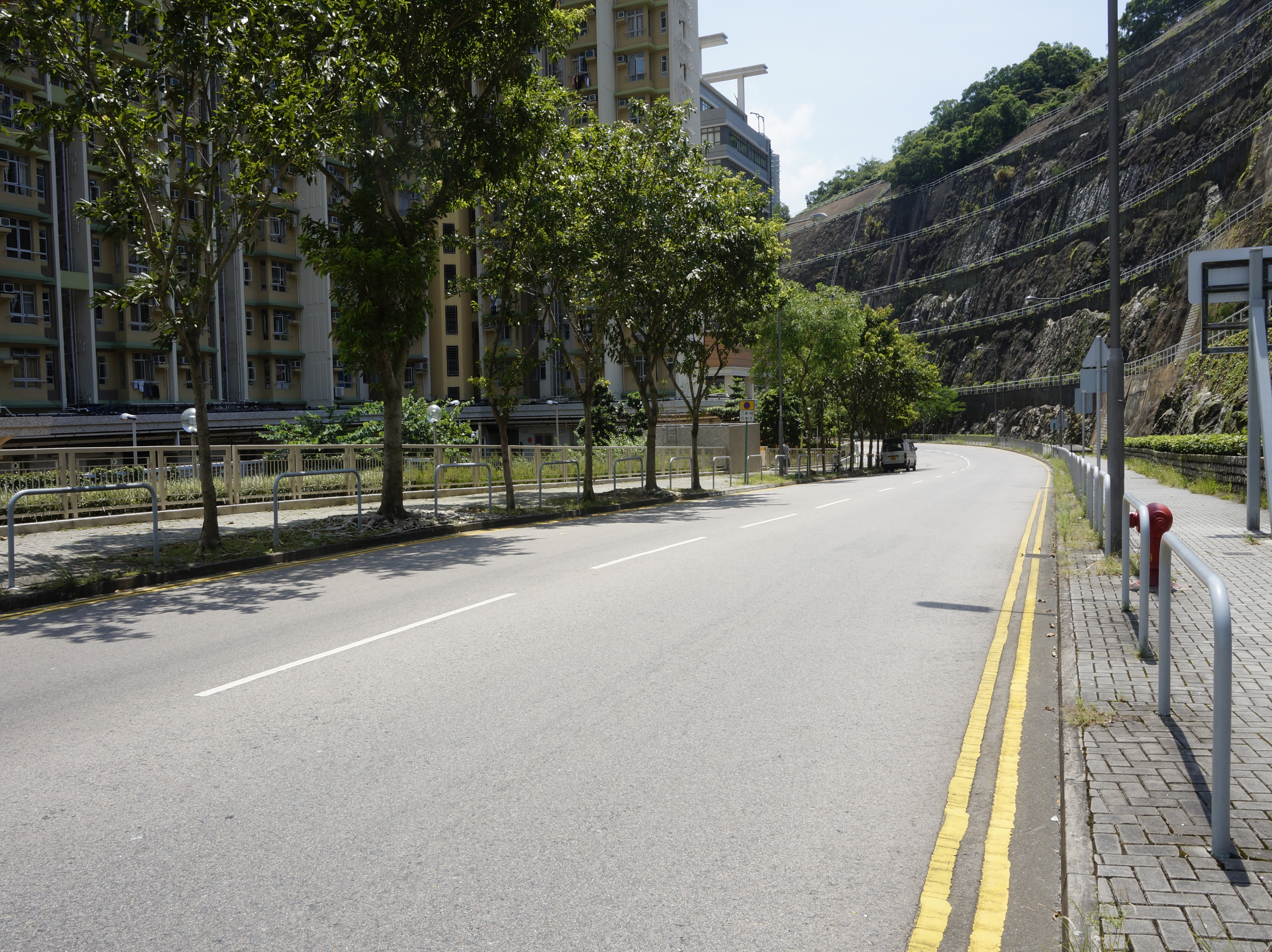 翠嶺路的入口